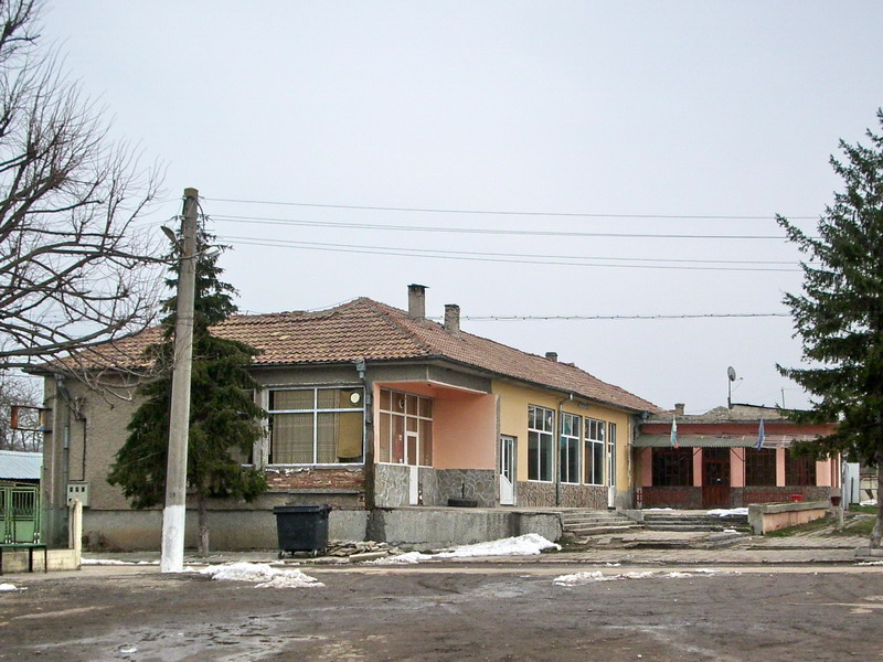 Село Глогинка, община Попово. Центъра на селото.